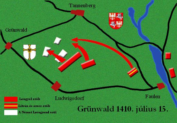 A Grünwaldi csata térképe.